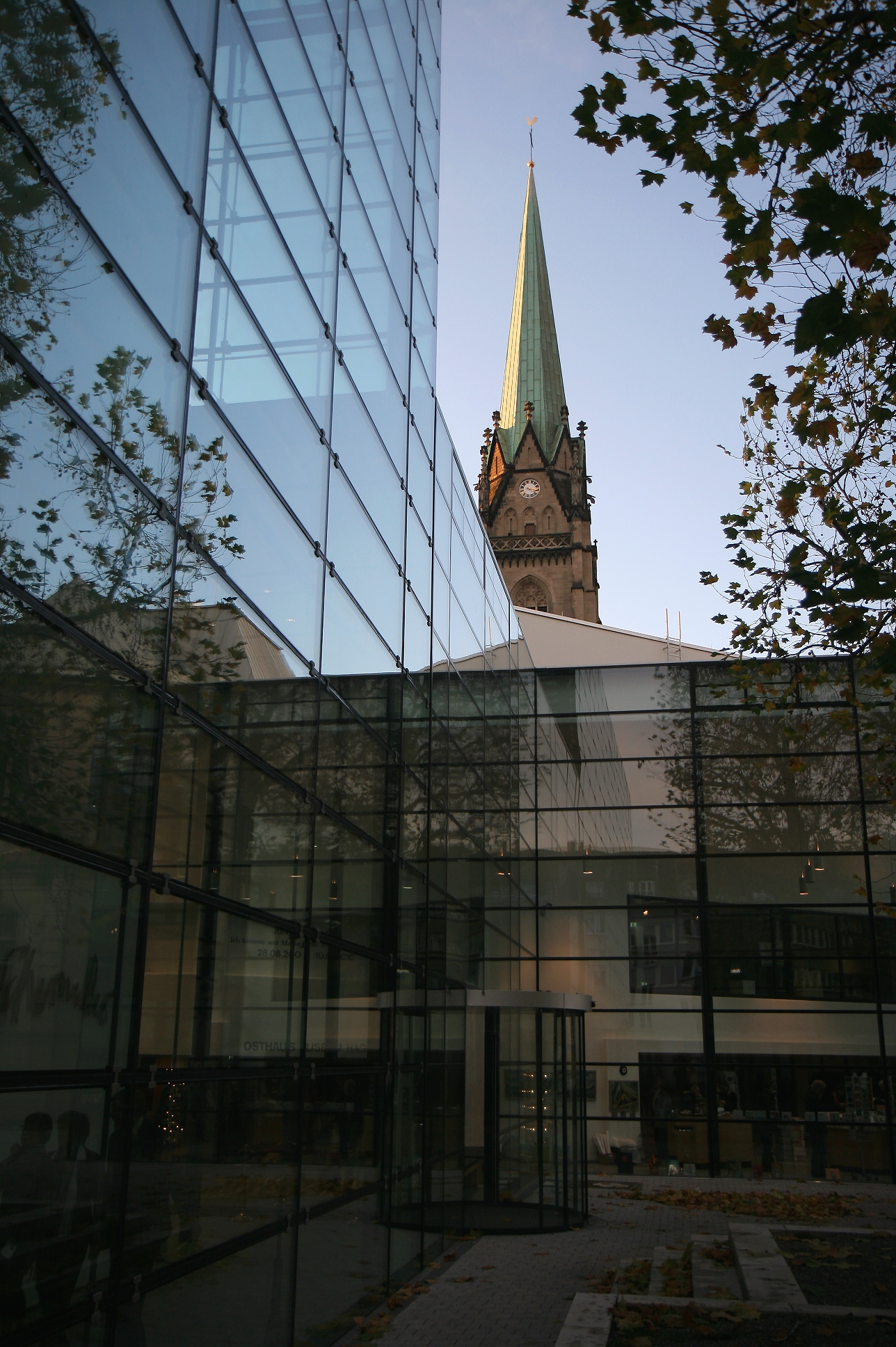 Eingangsbereich Kunstquartier Hagen, Museumsplatz 1 in Hagen. Im Hintergrund die Kirchturmspitze der katholische Kirche St. Marien.